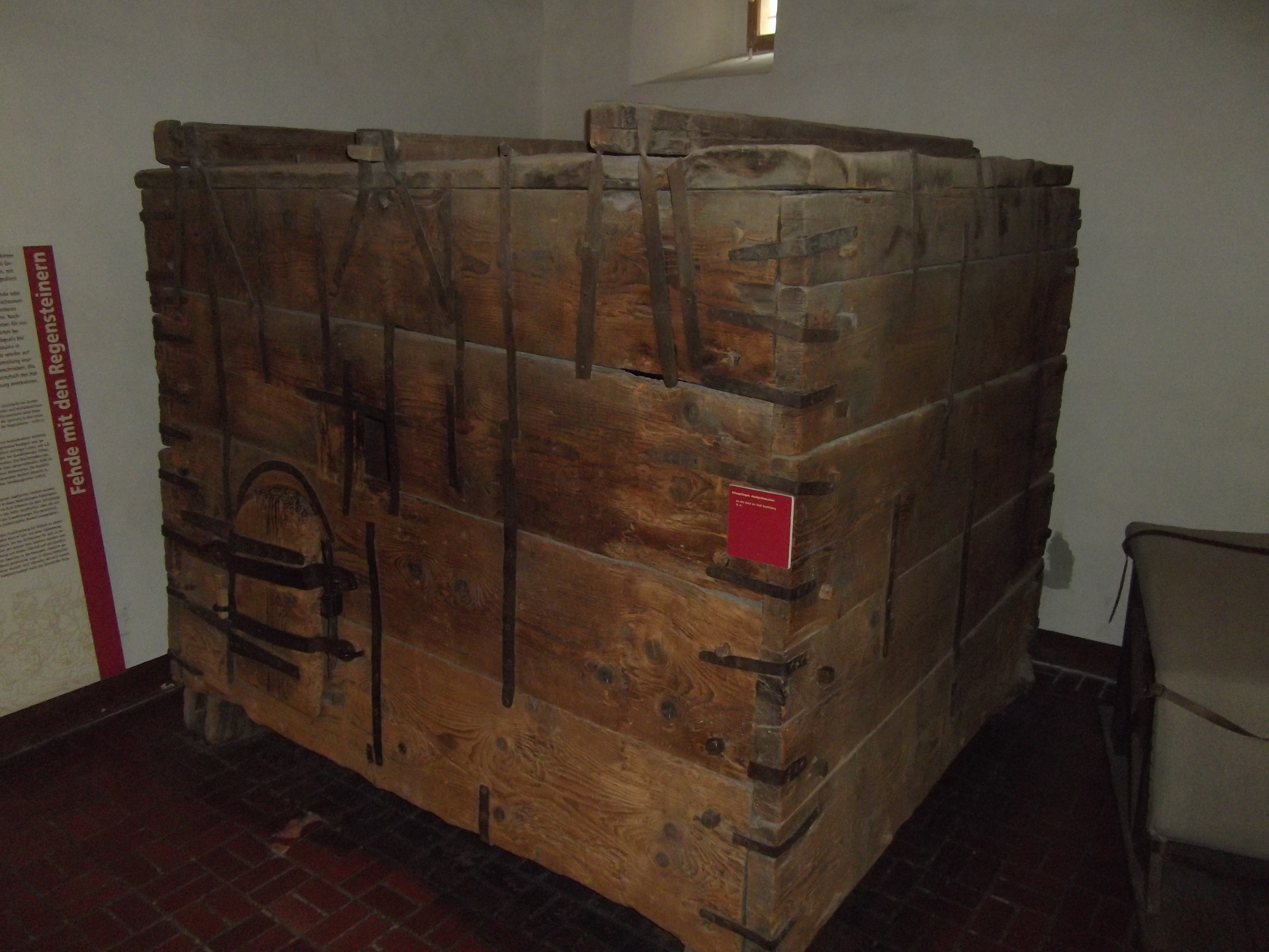 Raubgrafenkasten im Museum Quedlinburg